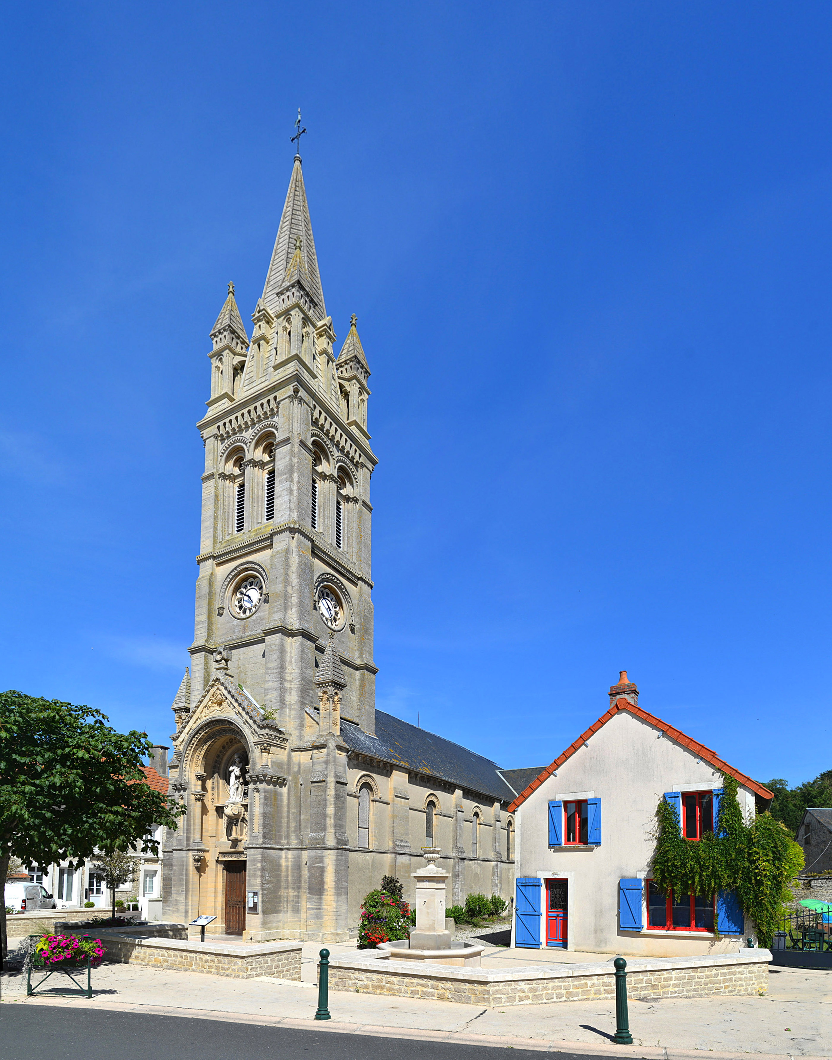 Arromanches-les-Bains (Calvados)